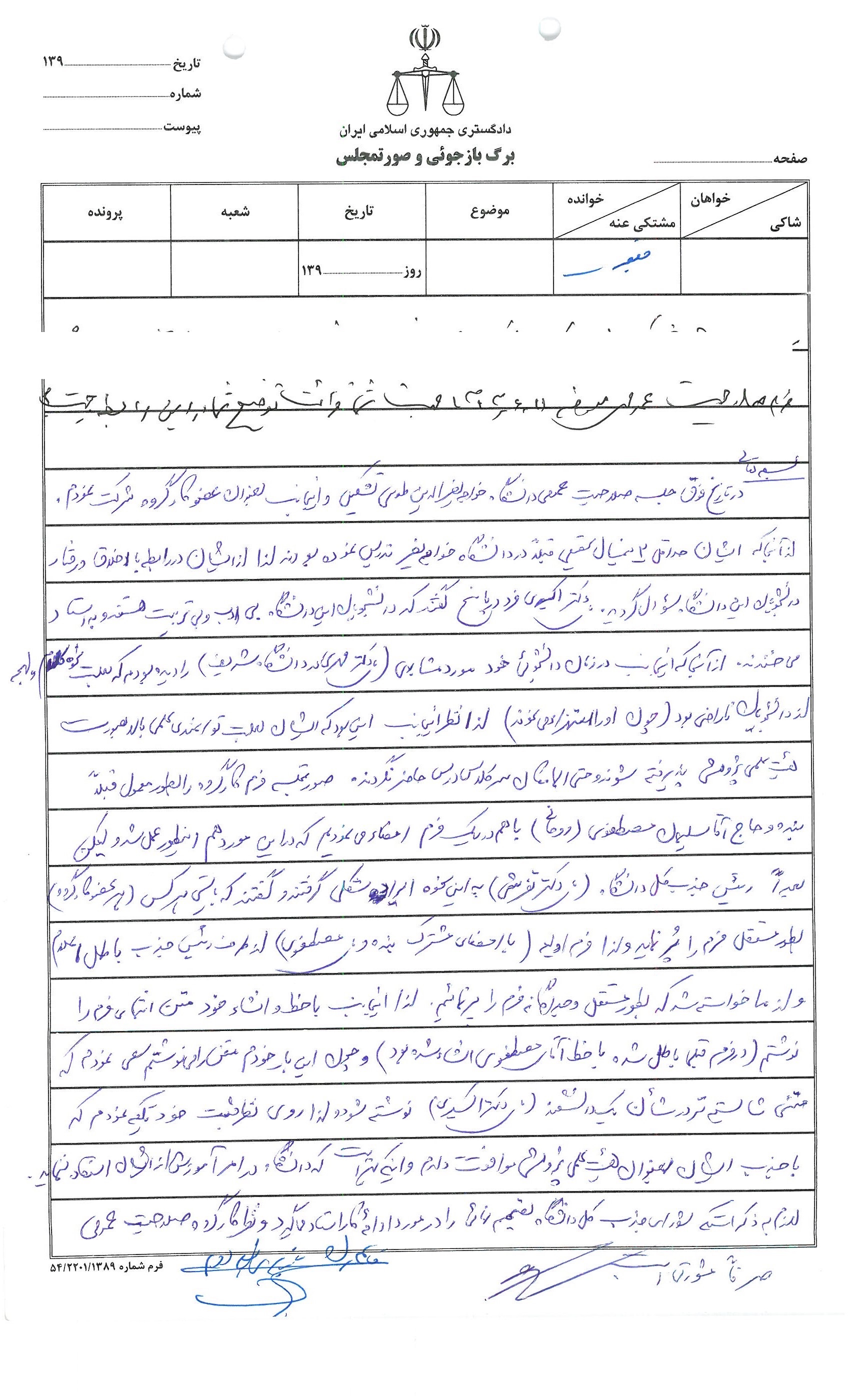 توضیحات دکتر علی اصغر جعفری عضو کارگروه صلاحیت عمومی دکتر اکسیری فرد